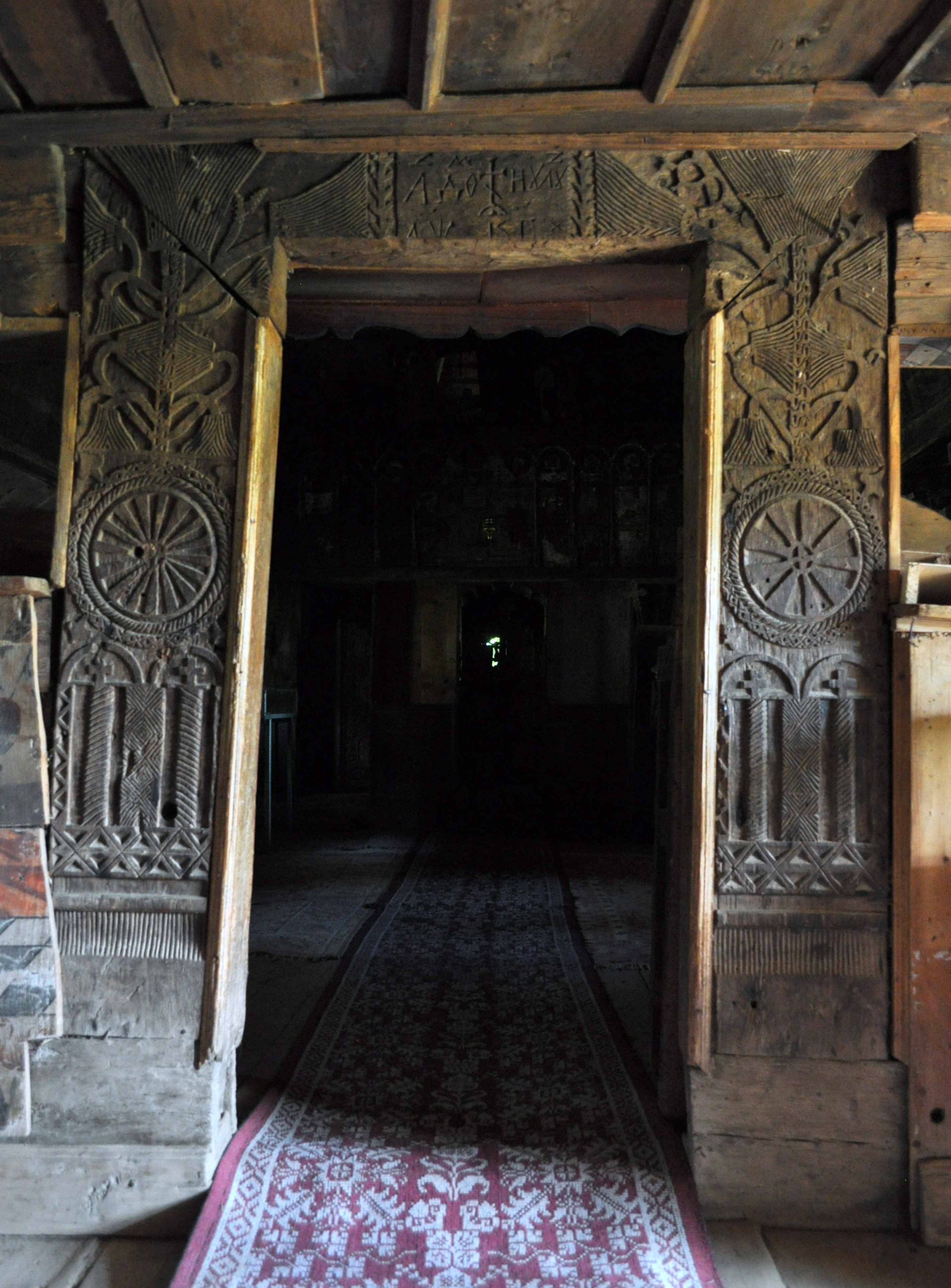 Biserica de lemn „Sfinții Arhangheli” din Băița, Mureș